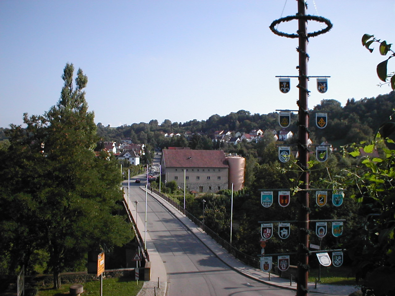 Jagstbrücke in neudenau, mit Figur des Brückeheiligen Nepomuk von 1958